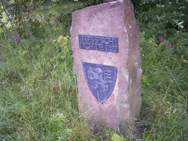 Stein mit Aufschrift von Hess. Lichtenau